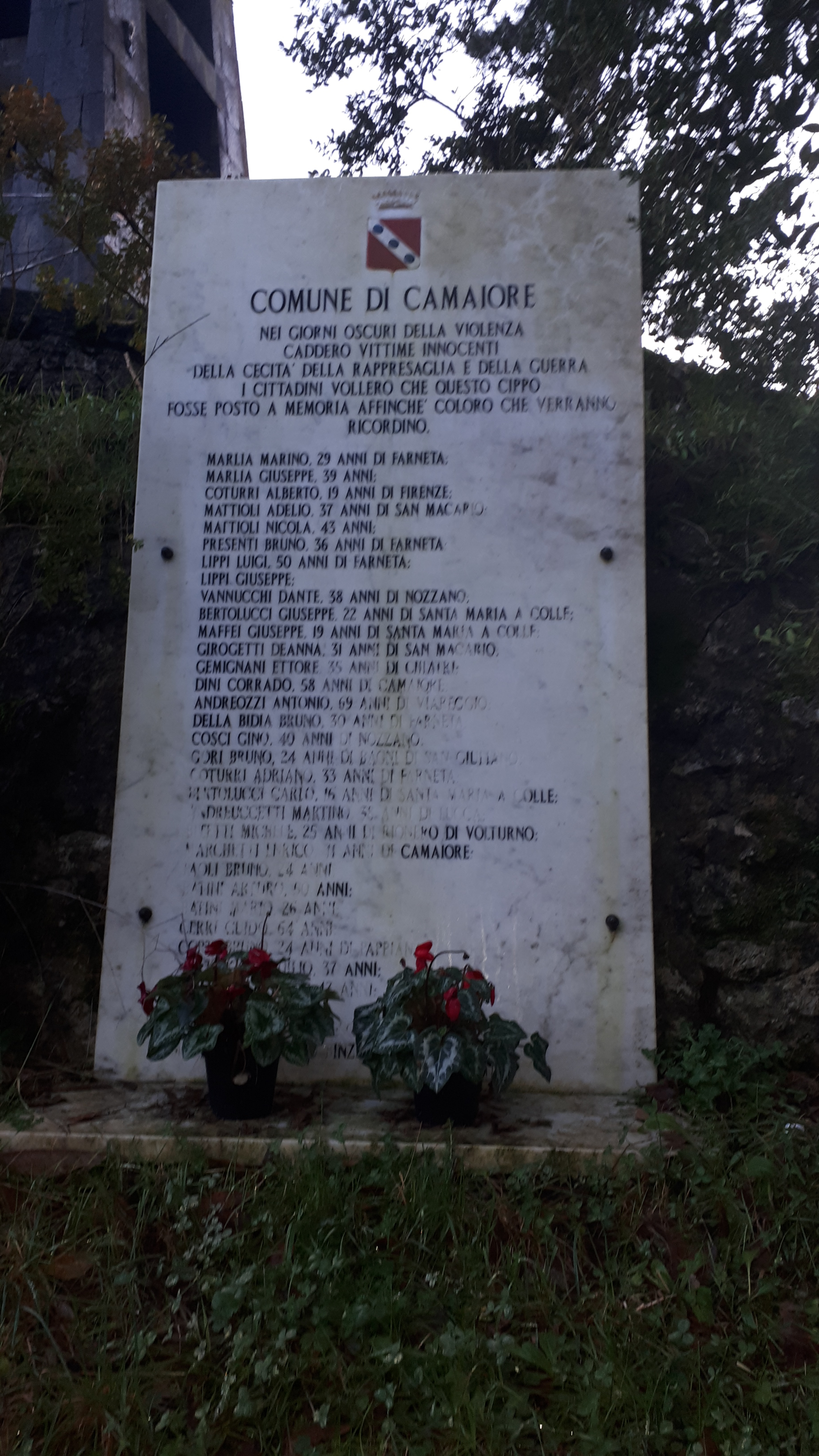 Monumento ai caduti